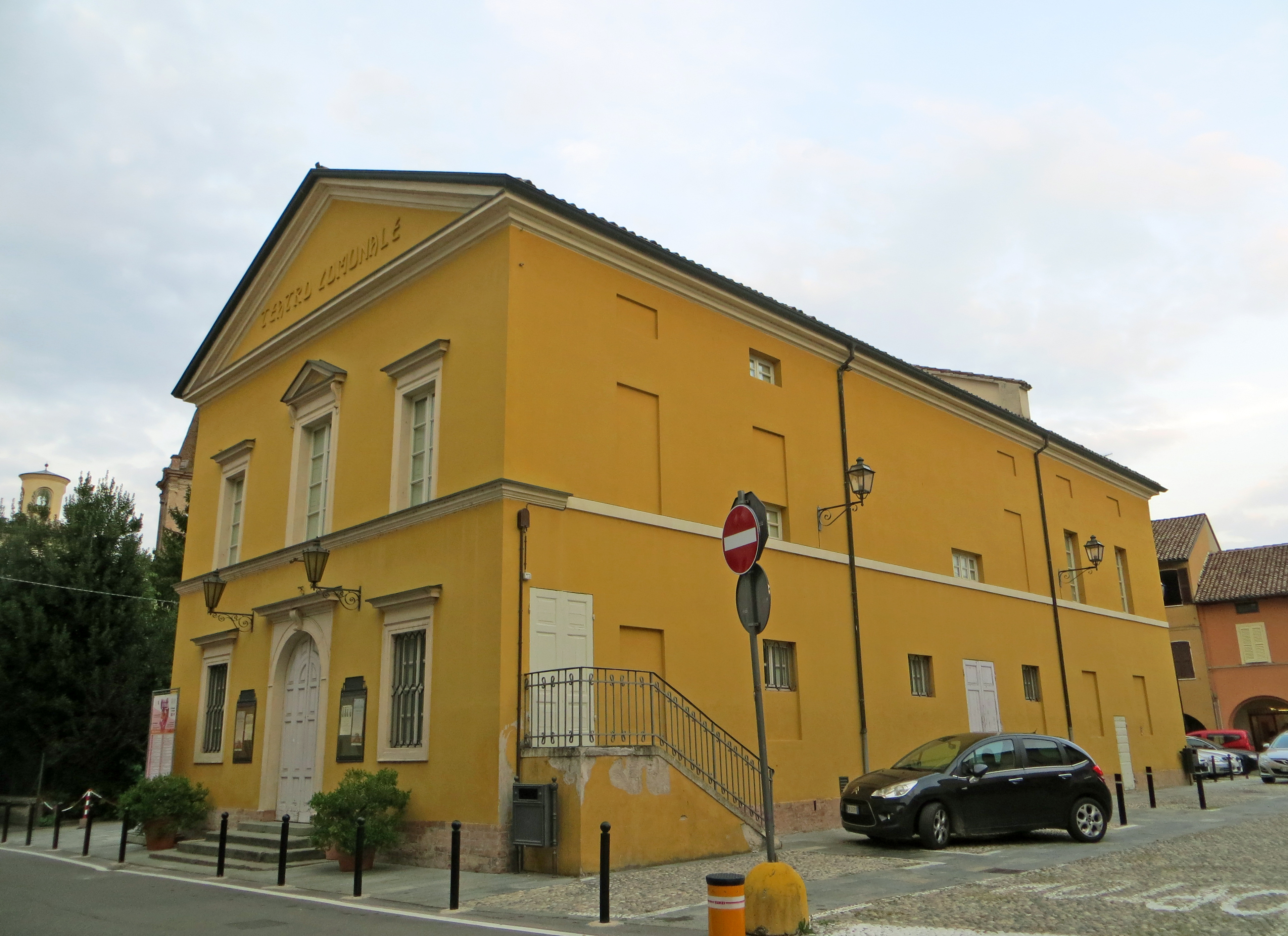 Teatro comunale (Fontanellato) - facciata e lato sud